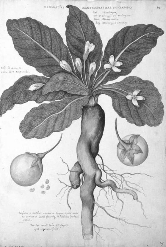 Mandragora: Libri picturati A 30 f. 85